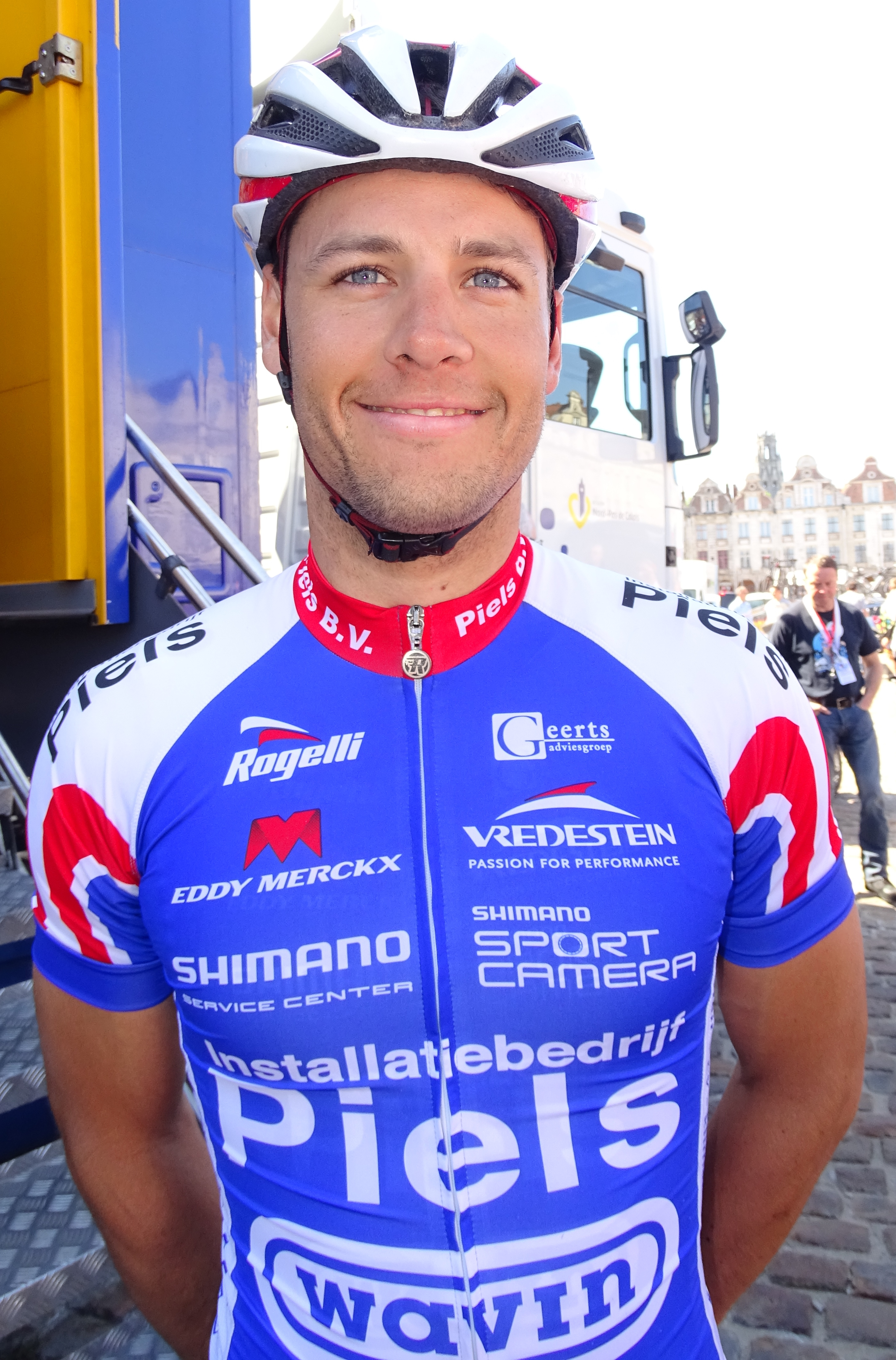 Reportage réalisé le dimanche 24 mai 2015 à l'occasion du départ et de l'arrivée de la troisième étape du Paris-Arras Tour 2015 à Arras, Pas-de-Calais, Nord-Pas-de-Calais, France. Depicted person: Jeff Vermeulen Depicted team: Jo Piels